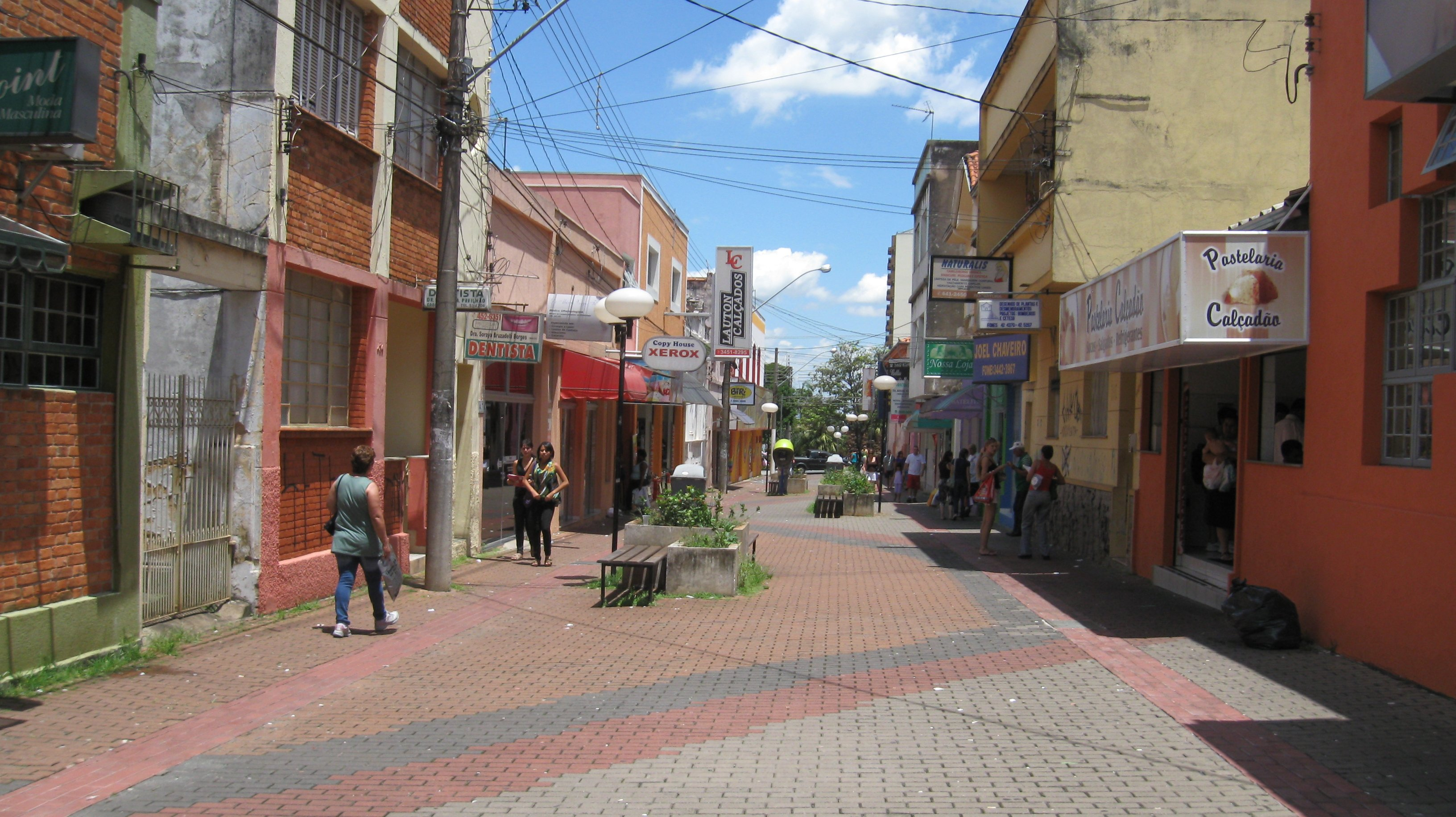 Foto do Calçadão de Limeira denominado oficialmente Área de Lazer Maria Kuhl Tank, na região central da cidade.